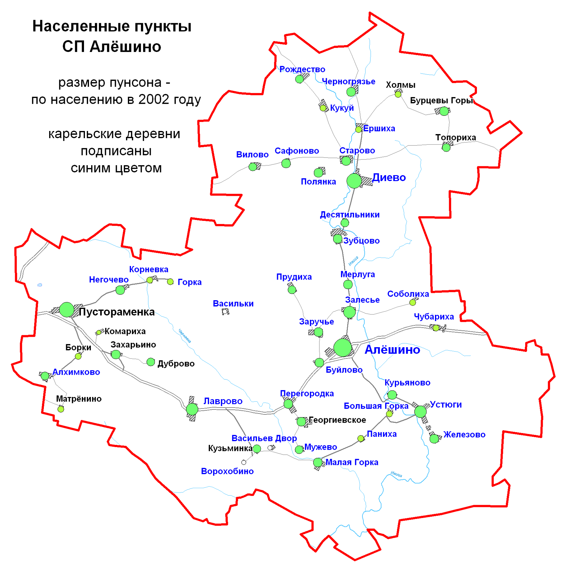 Схема нп Алёшинского сп